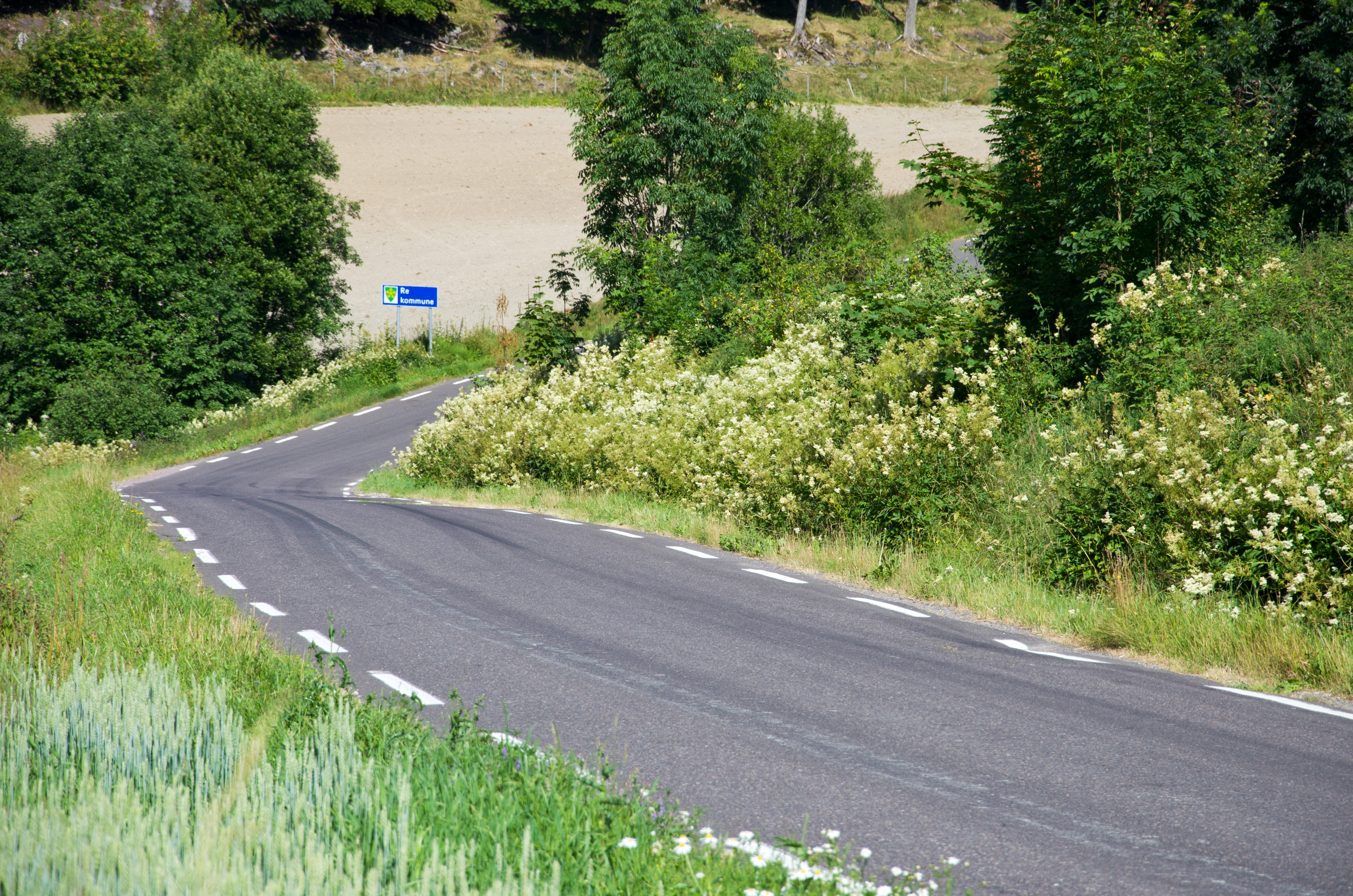 Fylkesvei 666 Pauliveien i Re, Vestfold